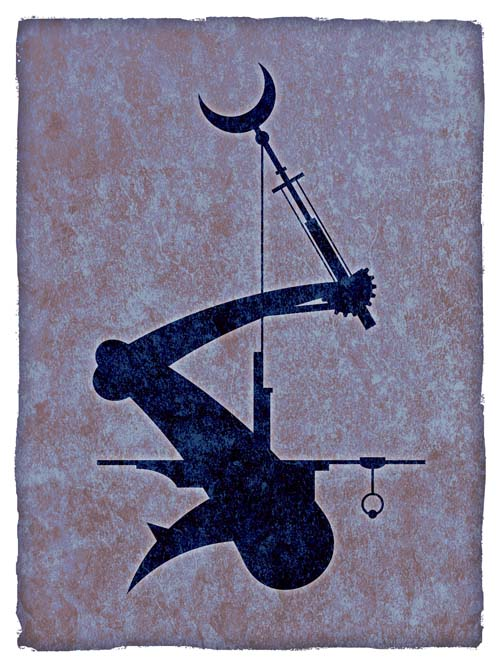 Benedek Imre (Budapest, 1972. február 22.) alkalmazott grafikus alkotása.